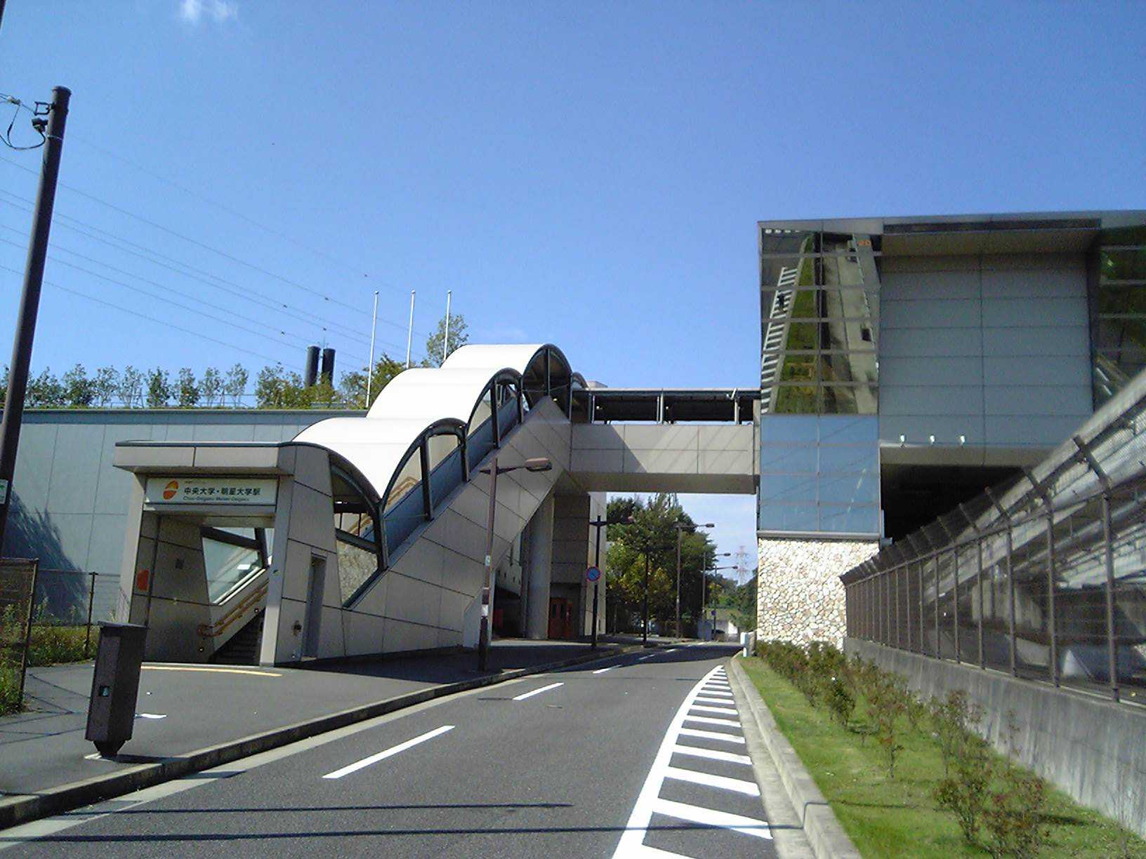 東京都八王子市東中野にある多摩都市モノレール線の中央大学・明星大学駅。